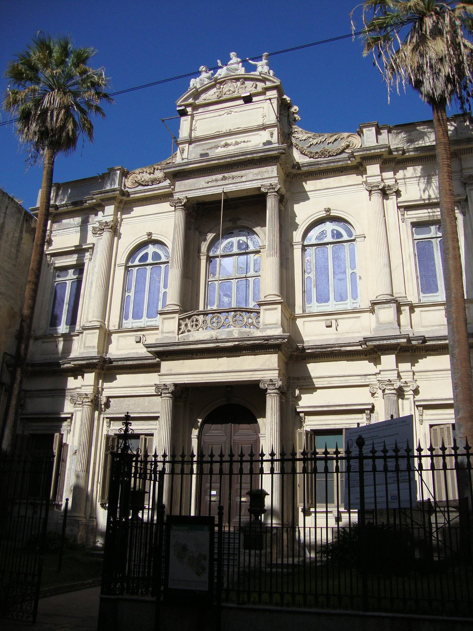 Museo Etnográfico "Juan B. Ambrosetti", dependiente de la Facultad de Filosofía y Letras de la Universidad de Buenos Aires. Arquitecto: Pedro Benoit (hijo) Estilo: Italianizante Año: 1878 Calle Moreno 350, Buenos Aires, Argentina.